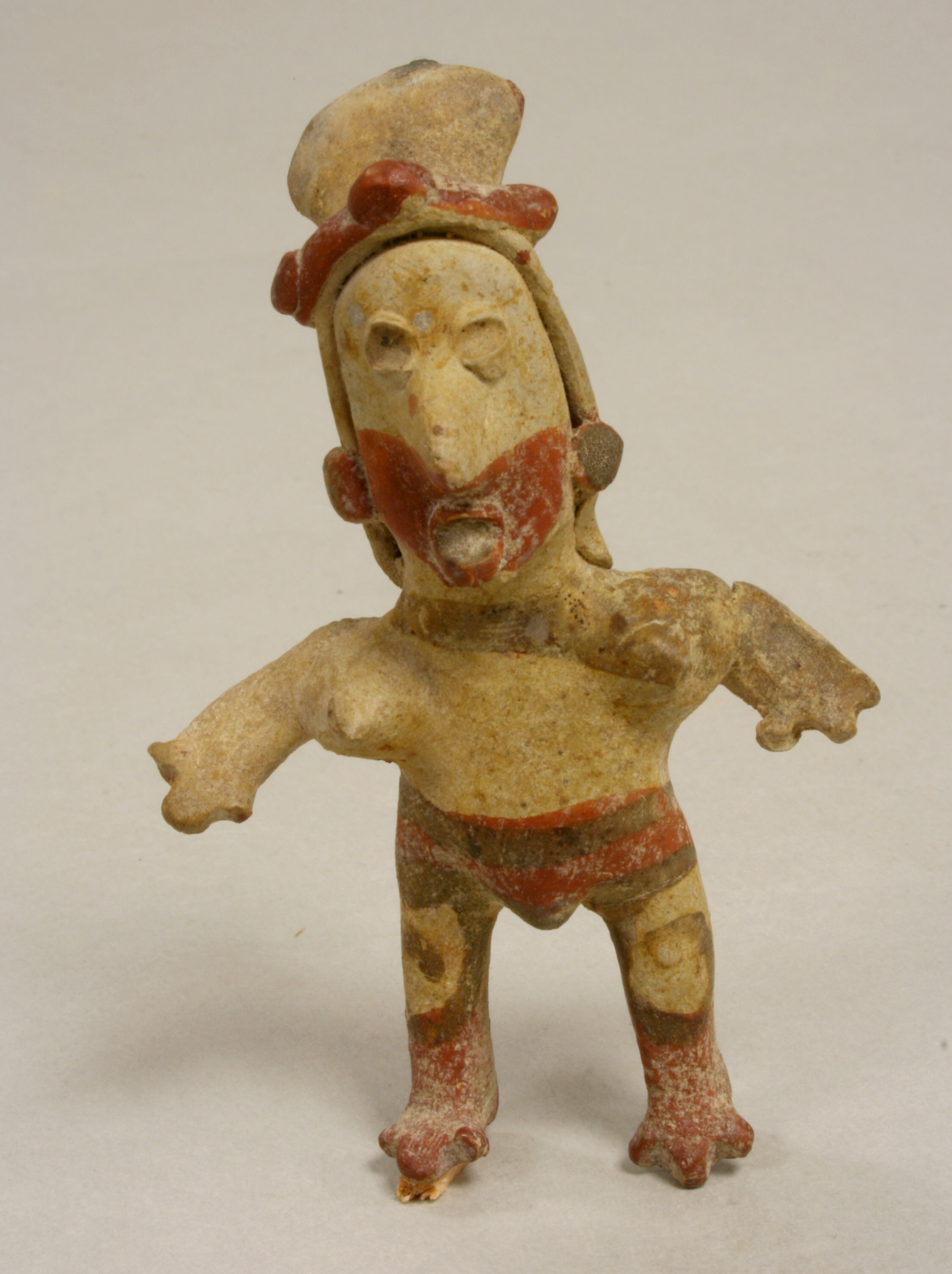 Jalisco; Figure; Ceramics-Sculpture